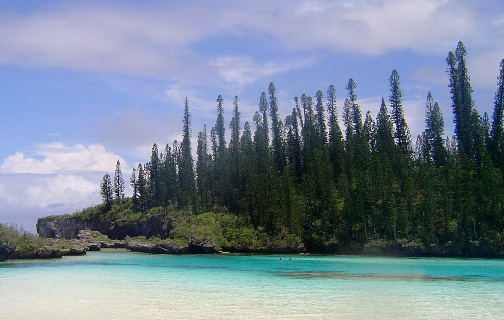 Araucaria columnaris, La Piscine Naturelle, Ile des Pins, Nouvelle Caledonie